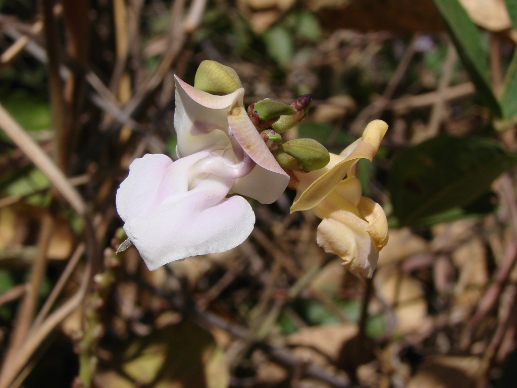 Vigna speciosa (Kunth) Verdc. (tem como bas. Phaseolus speciosus Kunth ) - FABACEAE - Parque Ecológico Dom Bosco - Brasília - Distrito Federal - Brasil.